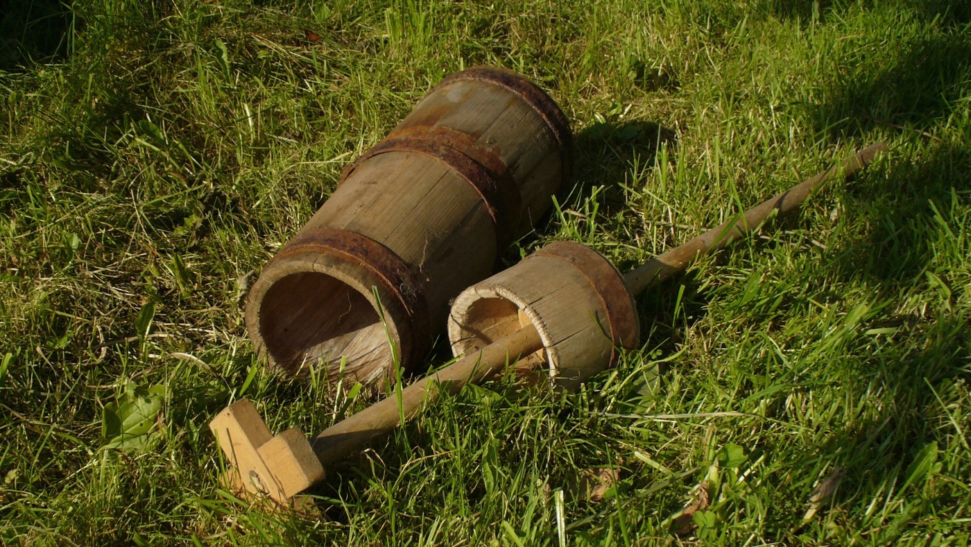 Маслобойка, применявшаяся для получения масла в домашних условиях. Витебская обл.